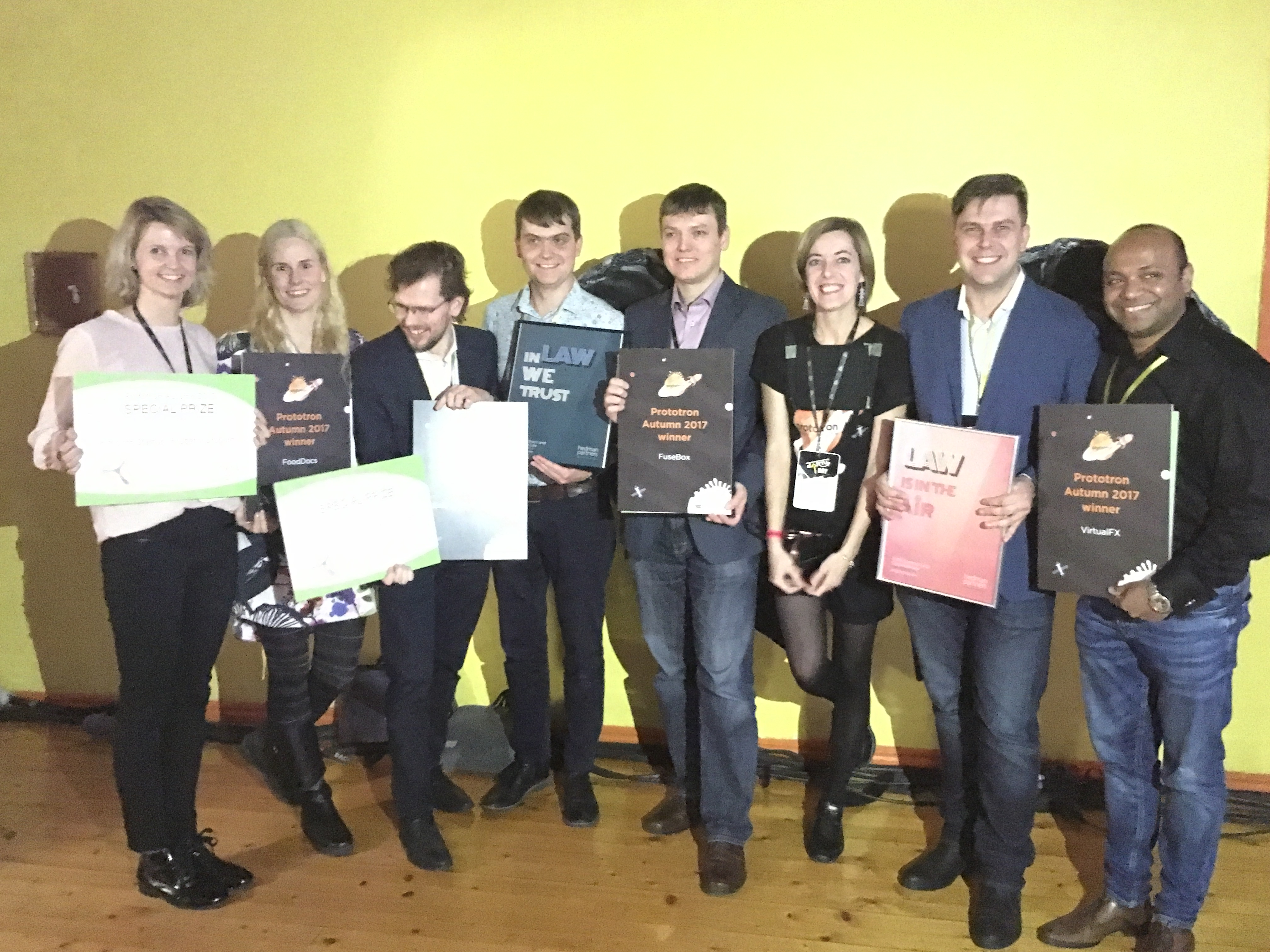 1=Prototroni 2017. aasta sügisvooru võitjad